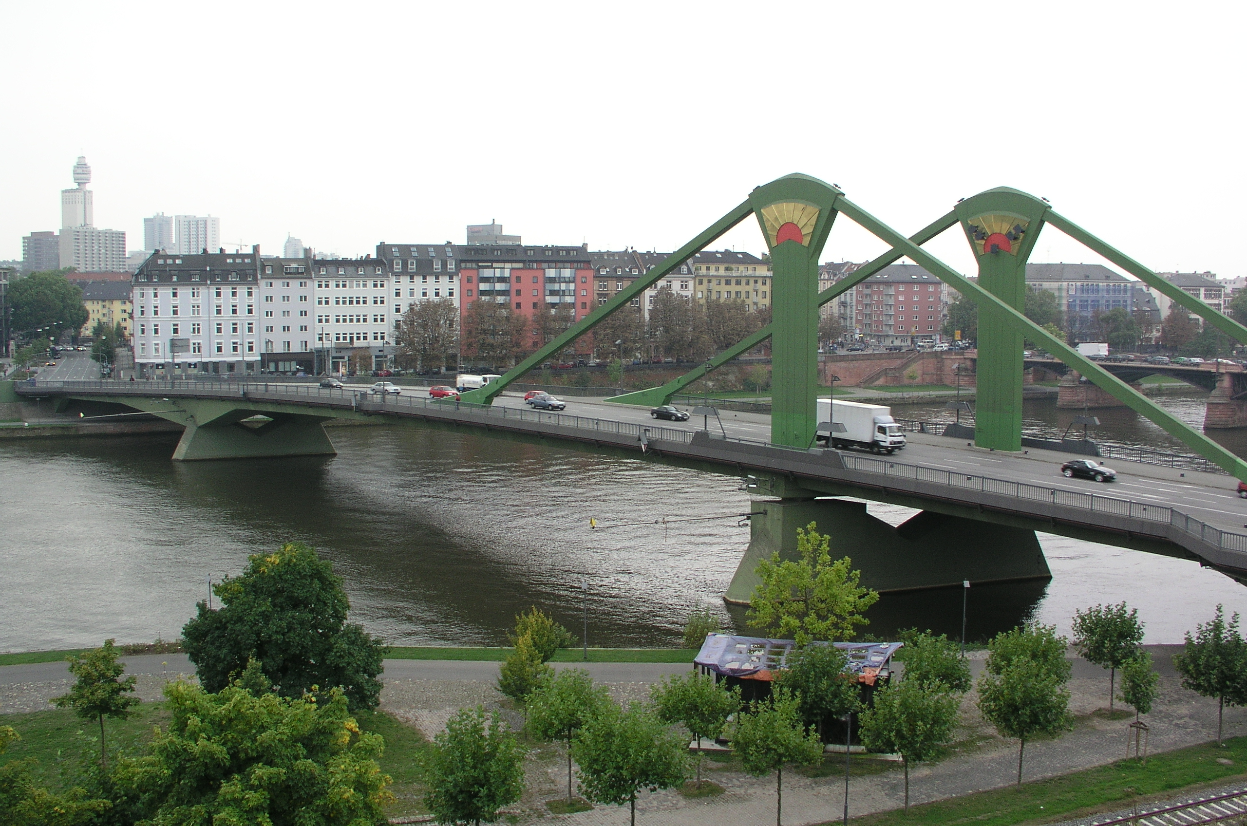 Flösserbrücke, Frankfurt am Main, Germany